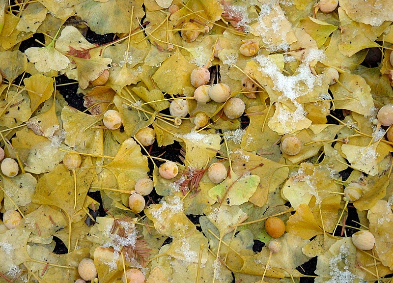 Ginkgo biloba, Palmengarten Frankfurt, Germany